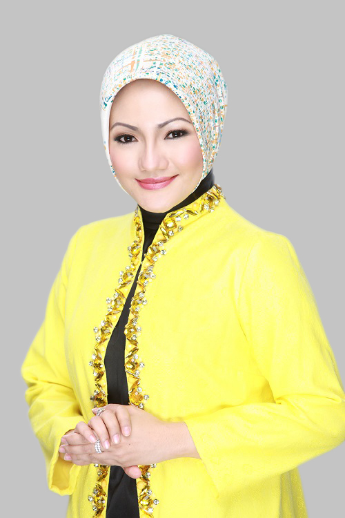 Hj. Adde Rosi Khoerunnisa, S.Sos., M.Si